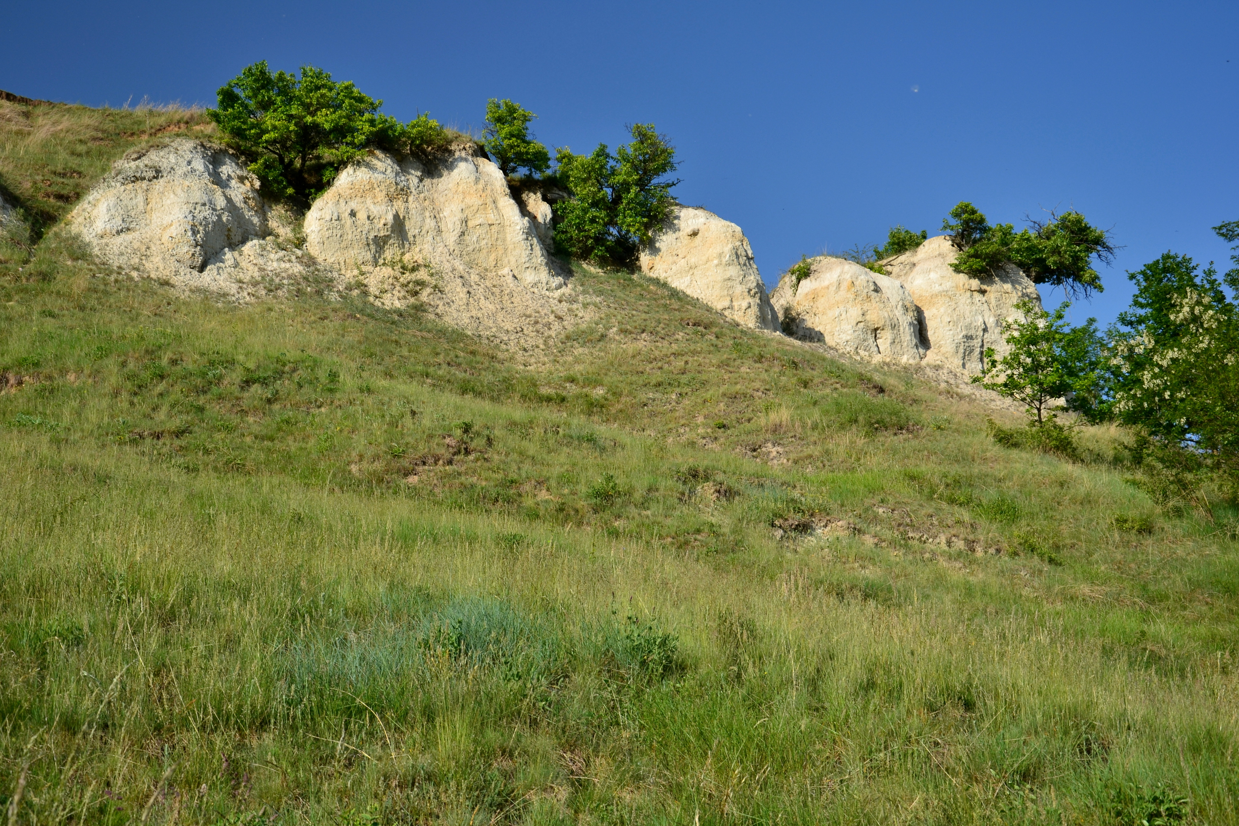 Centrální část lokality